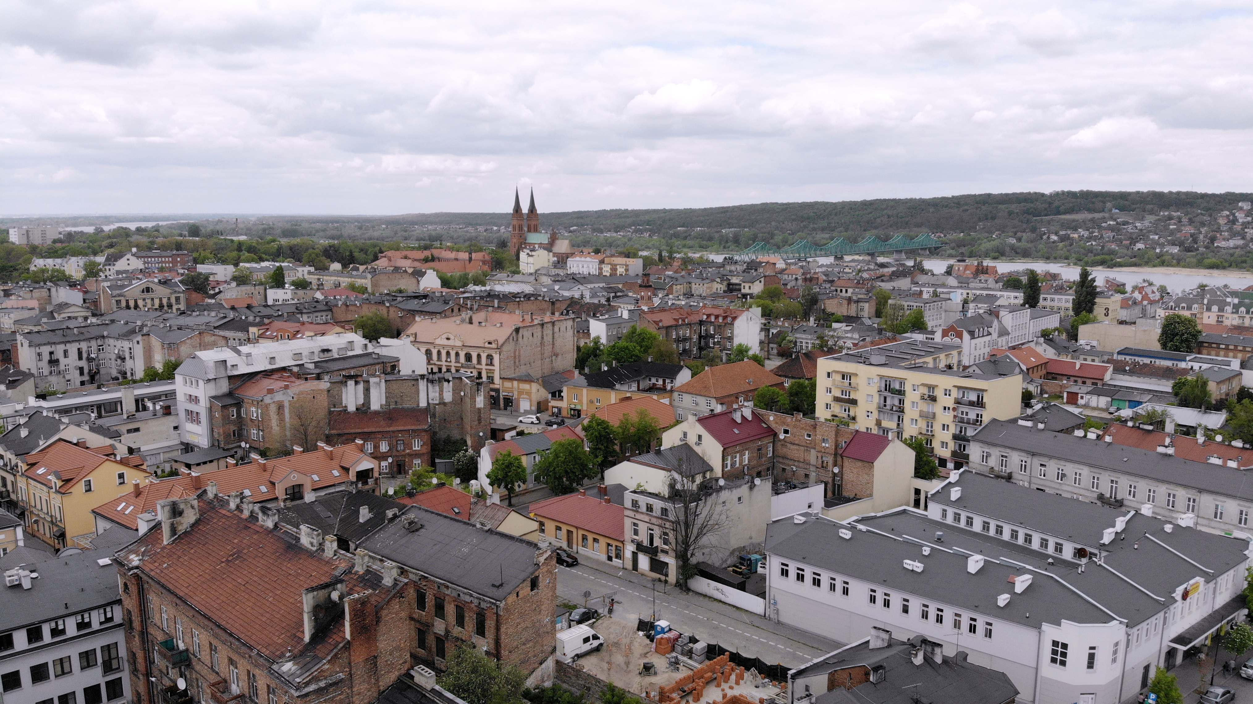 Śródmieście (2020 r.)